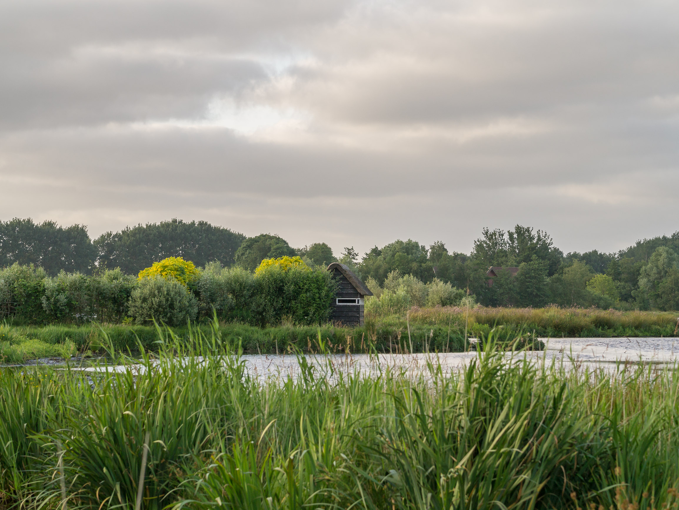 Kleine vogelkijkhut in de Alde Feanen This is a photo or sound file made in De Alde Feanen National Park in the Netherlands, with the main subject of the file in the category: humans in nature